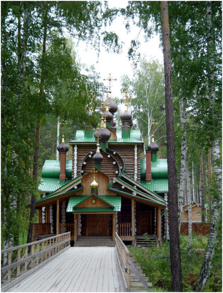 Царский храм